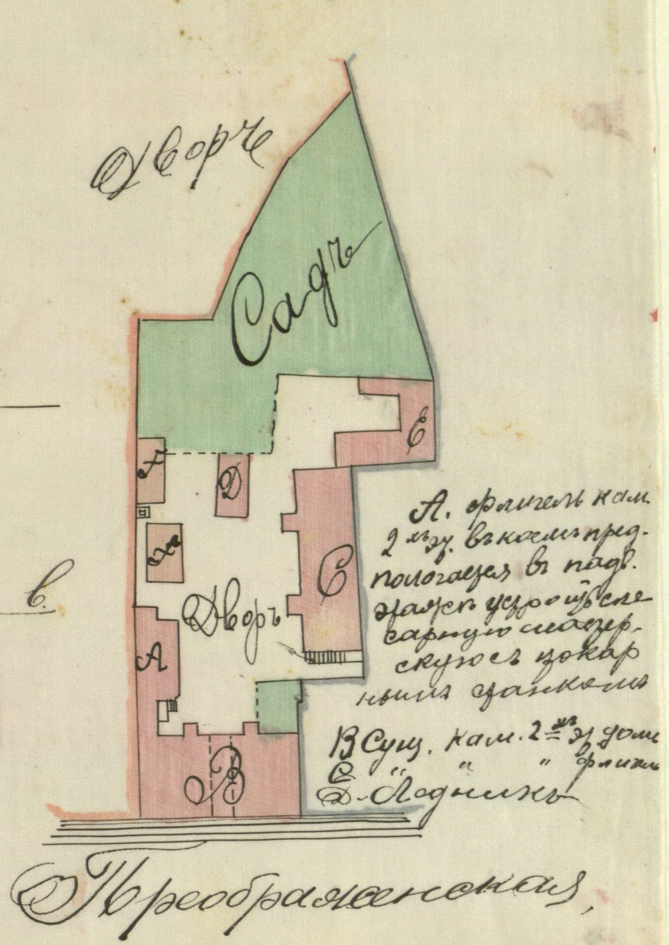 Мінск. План сядзібы дома Ліўшыца. На плане бачны пазначаны пункцірнай лініяй праезд. Канец ХІХ стагоддзя